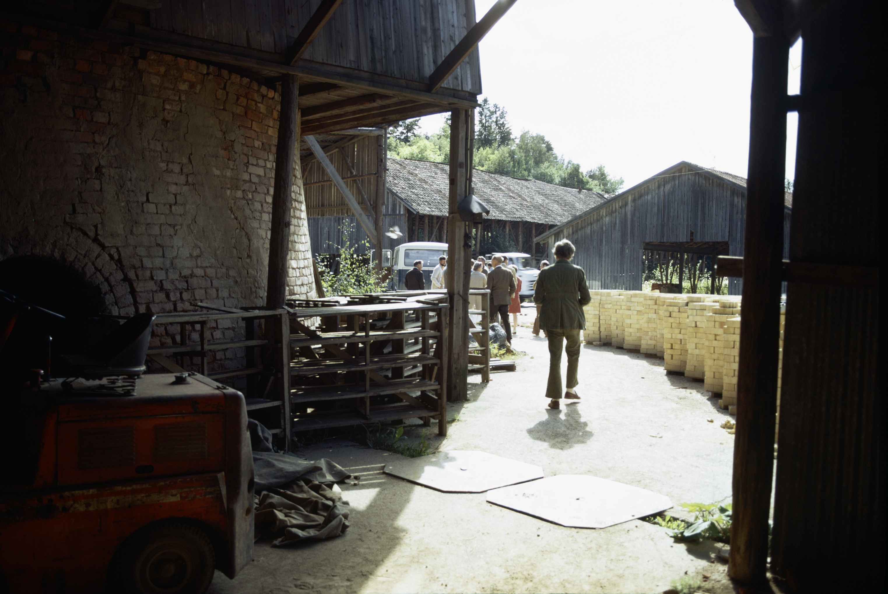 Fittja tegelbruk, Botkyrka socken, Botkyrka Kommun den 23 augusti 1971